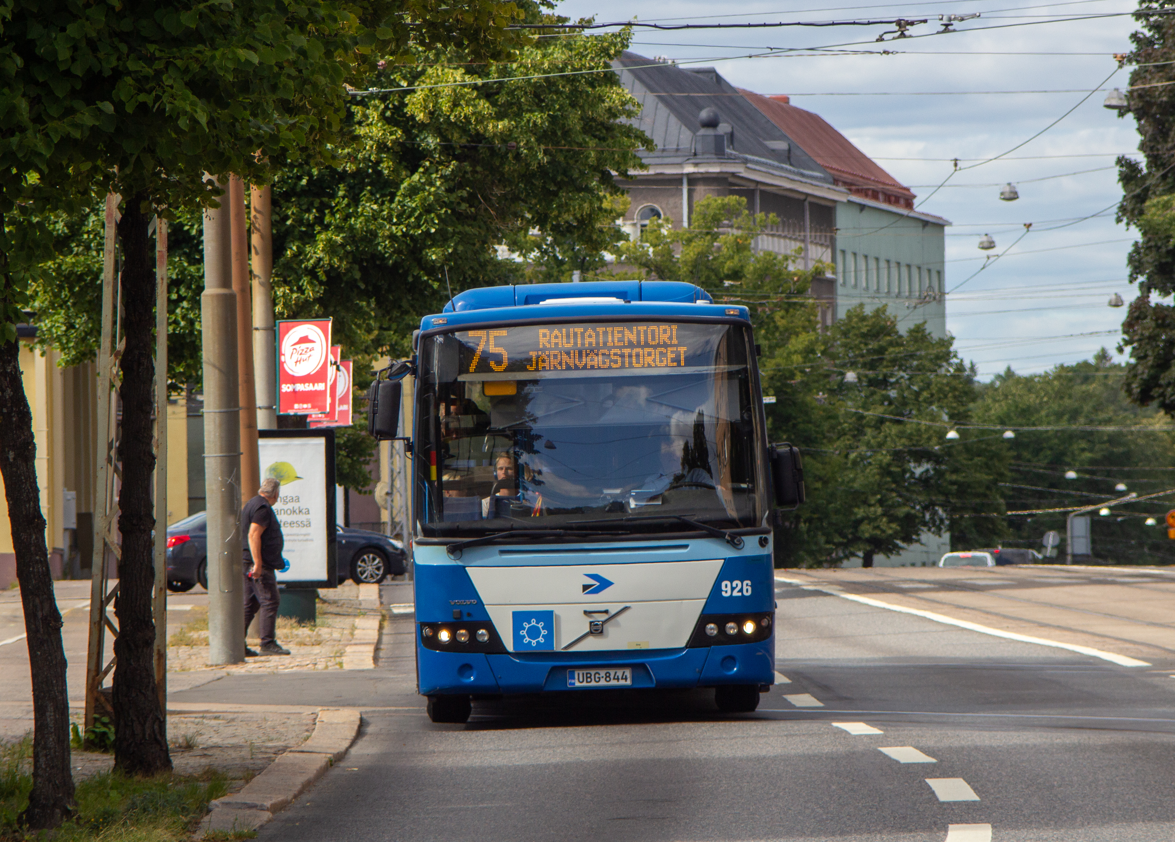 Helsingin Bussiliikenteen Volvo 8700LE (926) Helsingin sisäisellä linjalla 75.